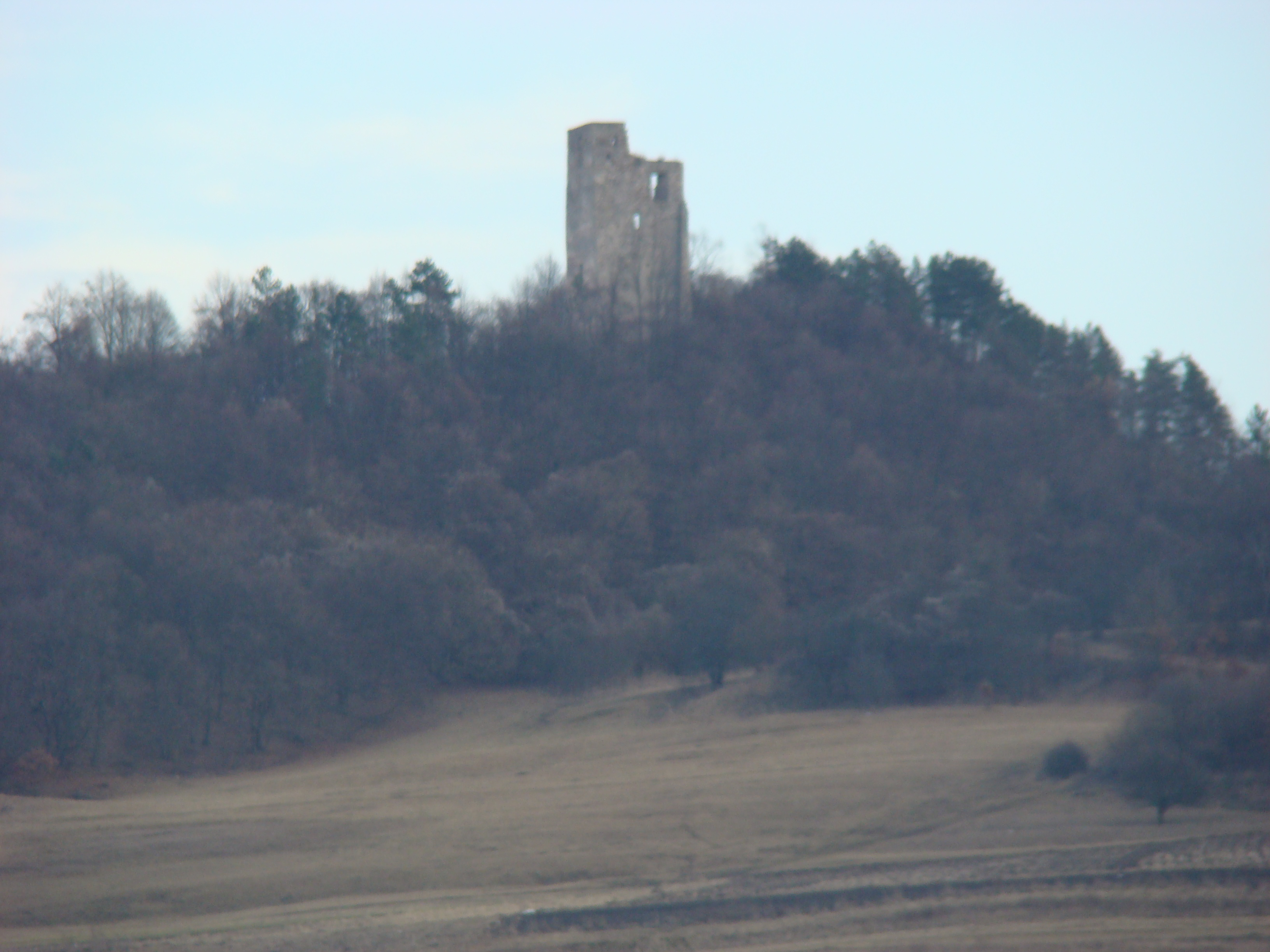 Imagine Almașu